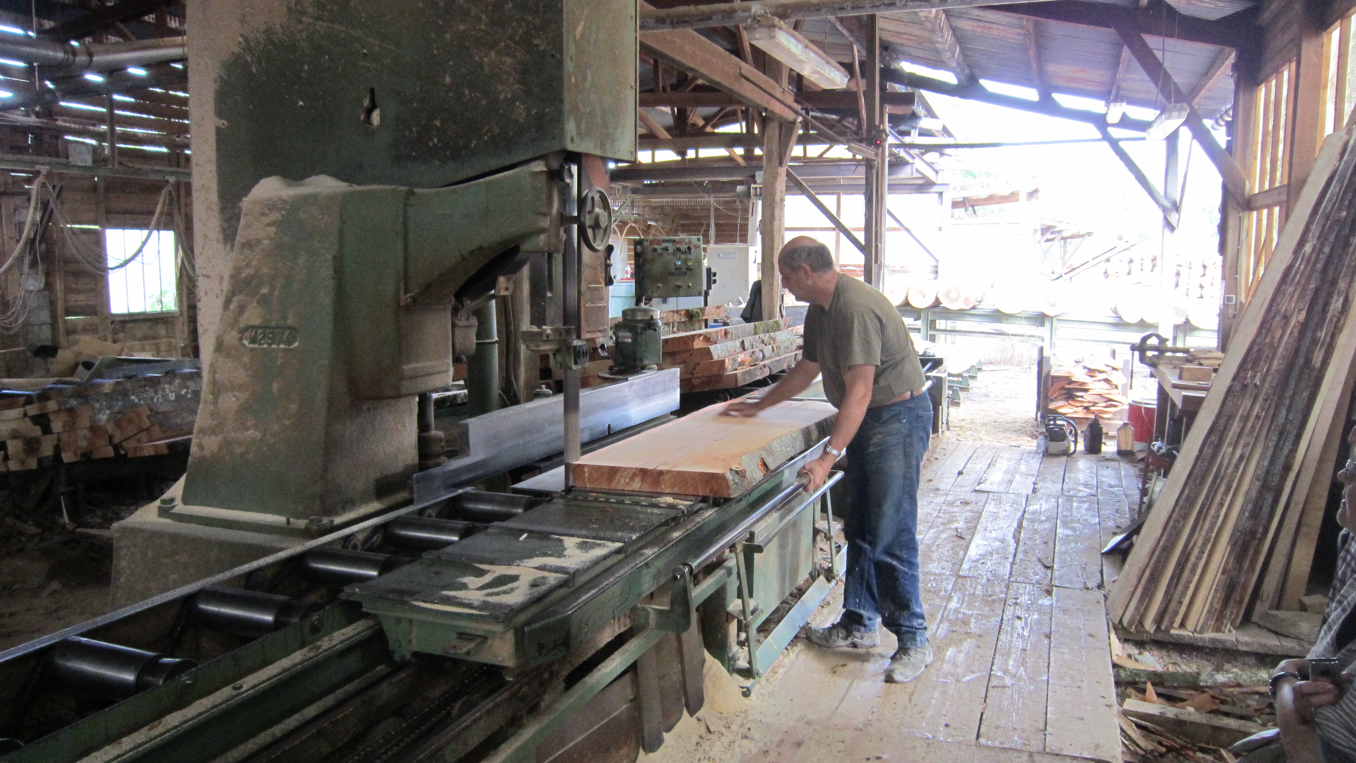 L'industrie du bois dans le Châtillonais